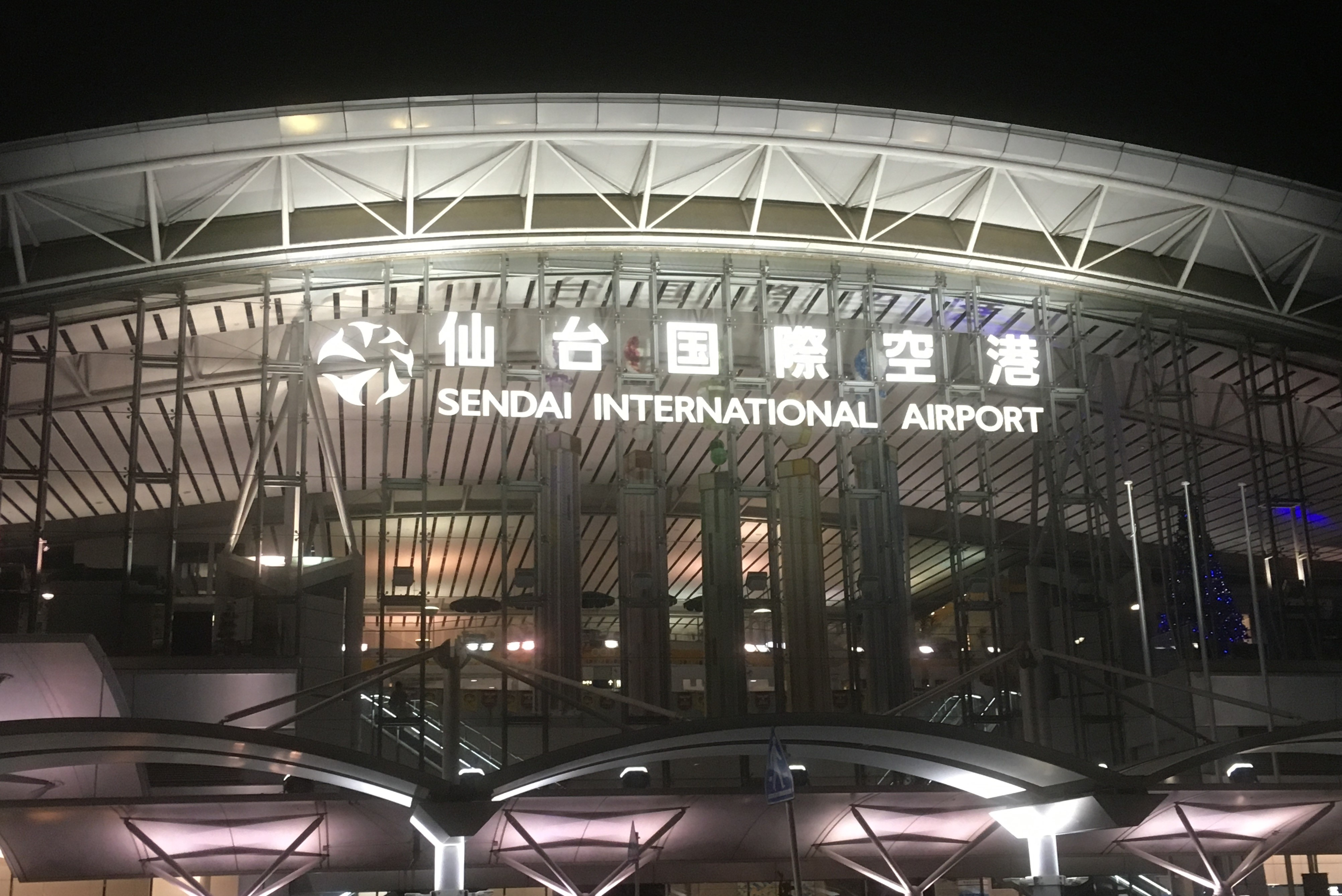 民営化後、掲示された「仙台国際空港」の表記